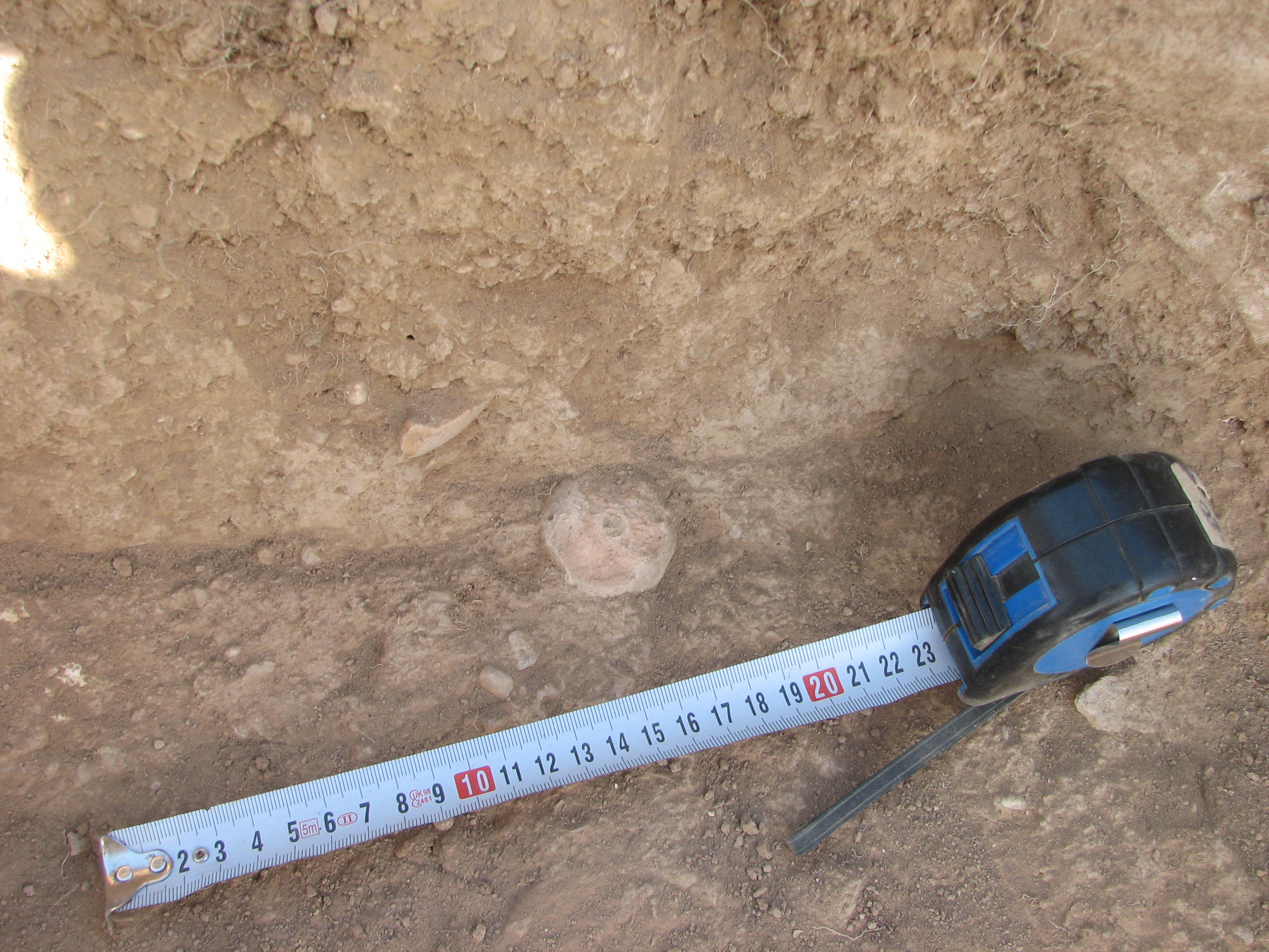 Fatzael 7 Chalcolithic Archaeology site in Fatzael Valley in the west side of Jordan Valley, Pictures from February 2010 excavation season אתר הארכאולוגי פצאל 7 מתוארך לתקופה הכלקוליתית, נמצא בבקעת פצאל בבקעת הירדן. צילומים מתוך עונת החפירות של פברואר 2010 פלך הטוויה שנמצא ליד החתך. מיד לאחר מציאתו לפני הוצאתו